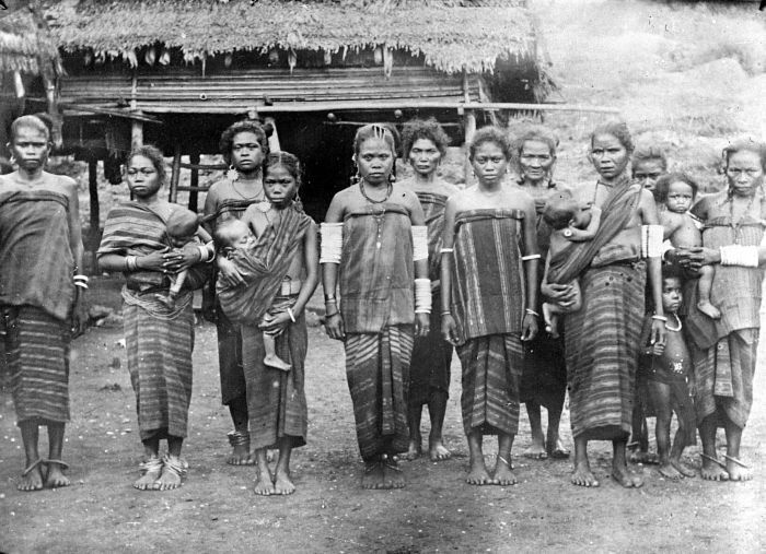 Repronegatief. Een groep vrouwen te Adaoet op Selaroe, Tanimbar-eilanden